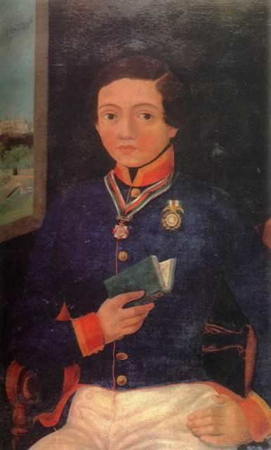 Pintura que representa al Niño Héroe Francisco de Borja Jesús Benito Márquez Paniagua (1834​-1847)